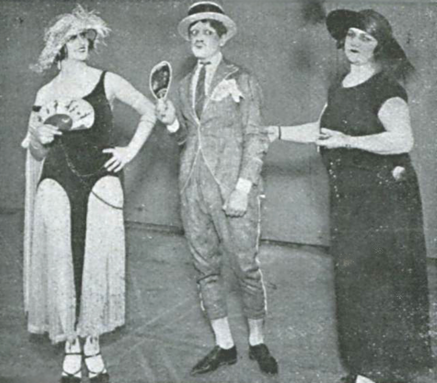 No teatro de revista personagens da peça "Sonho de Ópio".A partir da esquerda - Nair Alves (Lina) como melindrosa; Francisco Alves, seu irmão, como "almofadinha" e Marieta Field, como coronel.